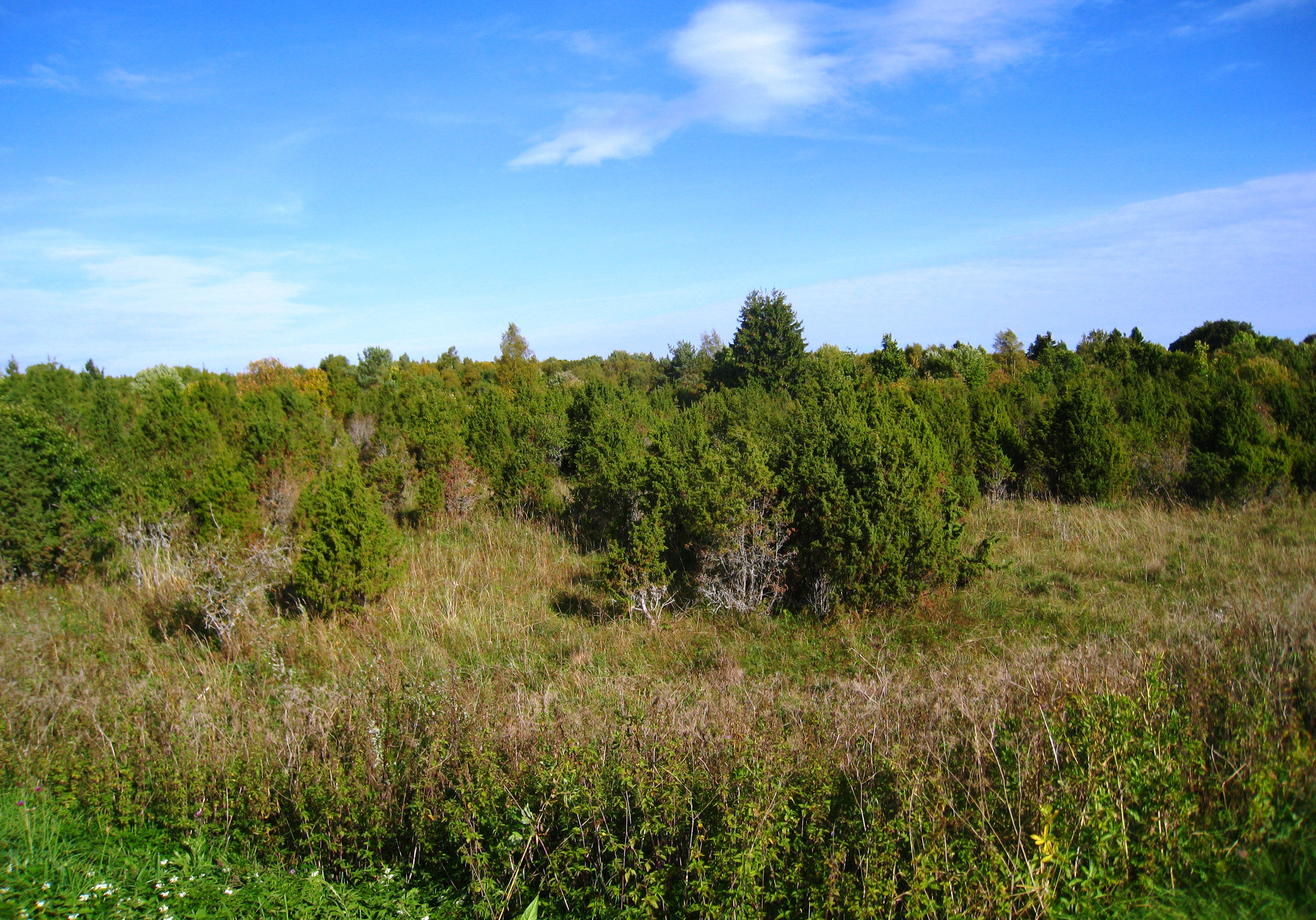 Loopealne kadakatega Soorinna külas.